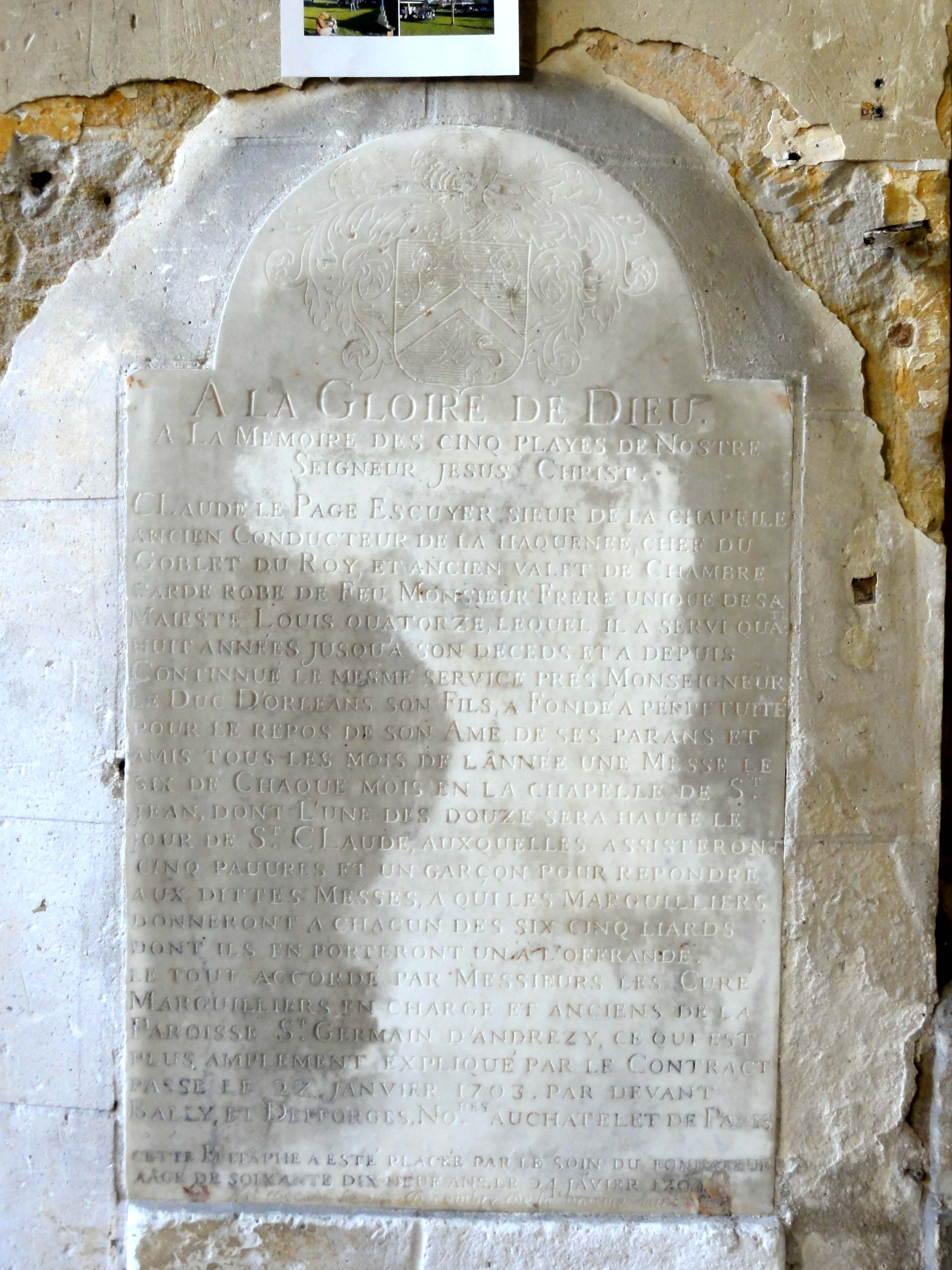 Plaque de fondation.